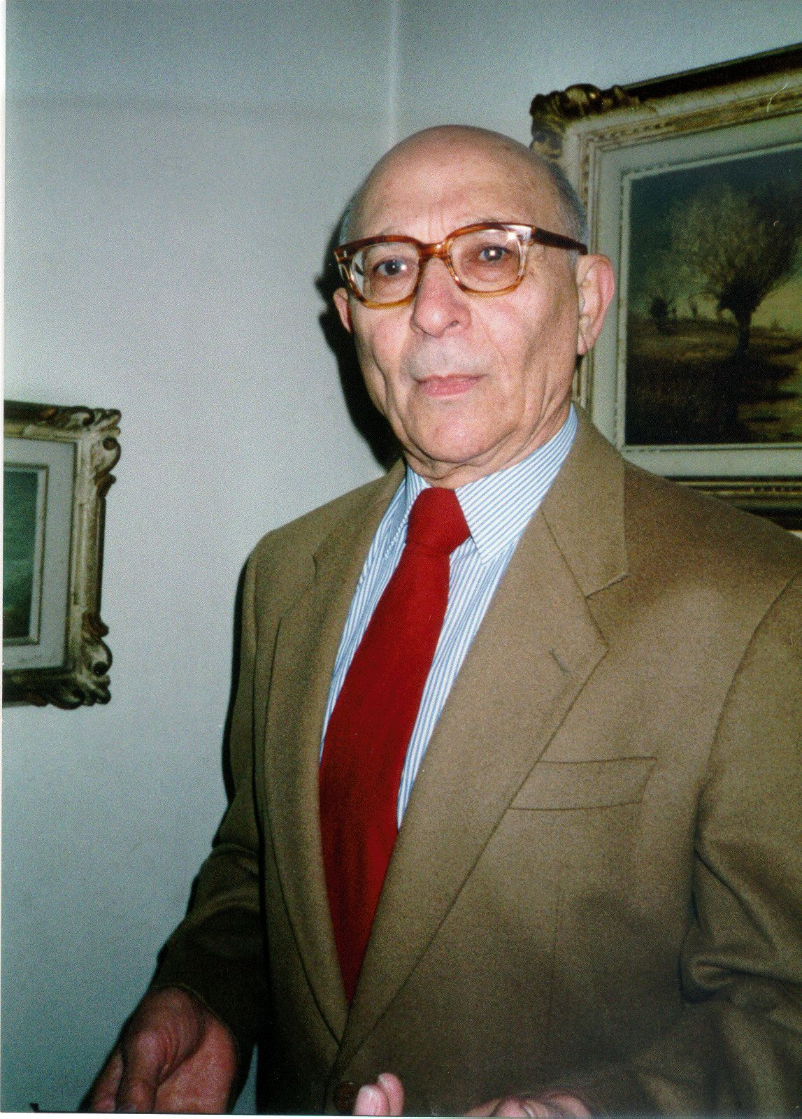 Franco Fochi ritratto nella sua casa di Pisa